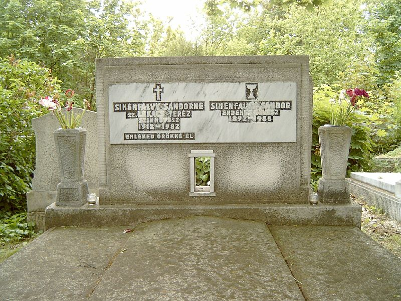 Siménfalvy Sándor (Szenice, 1892. júl. 9. – Bp., 1988. dec. 24.): színész, érdemes művész sírja Budapesten. Új köztemető: 74-1-43/44.